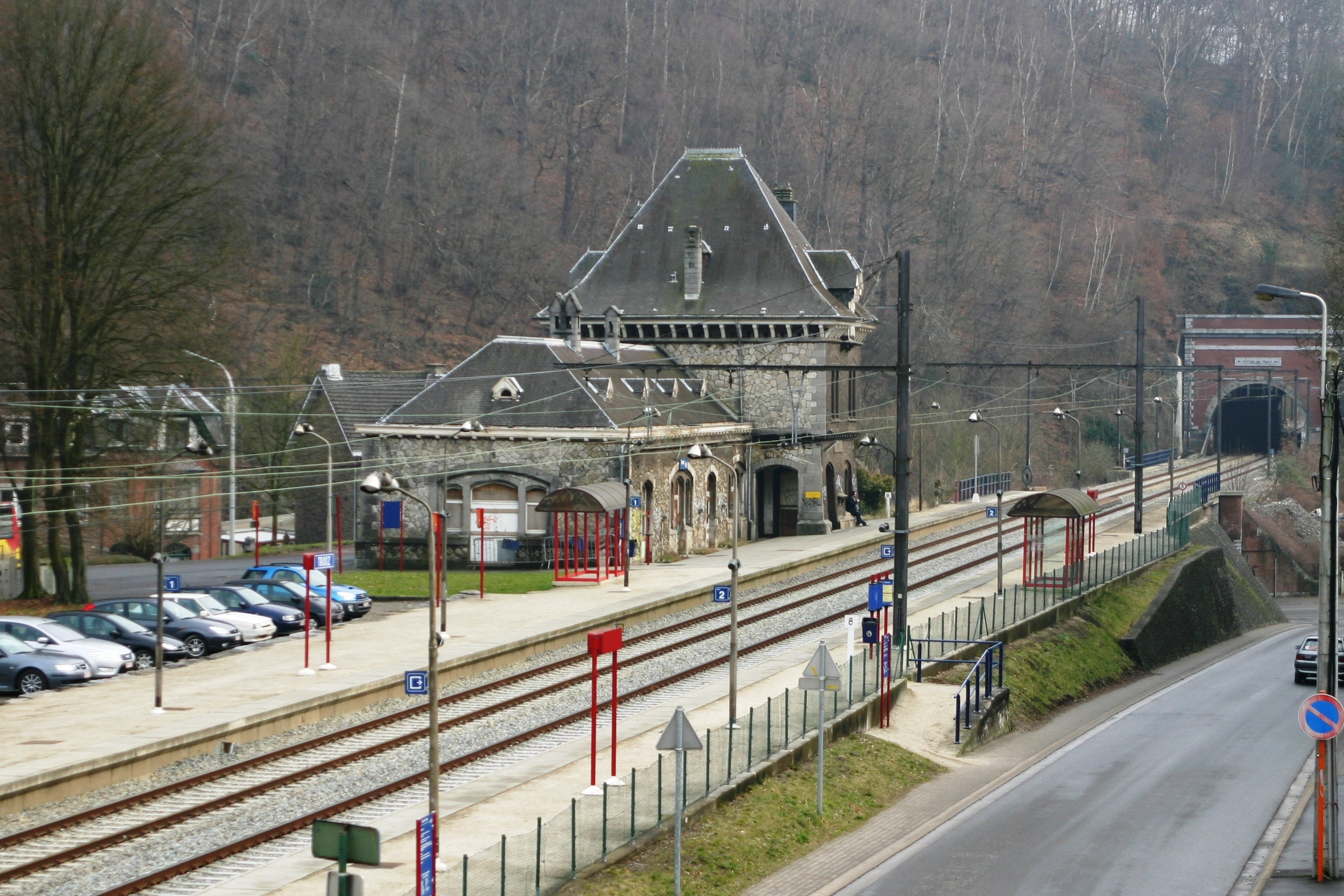 Gare vun Trooz a Richtung Verviers gesinn Trooz